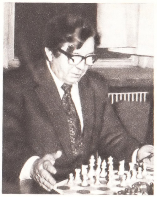 Władysław Gliński (ur. 20 maja 1920) – wynalazca i animator własnego wariantu szachów heksagonalnych.